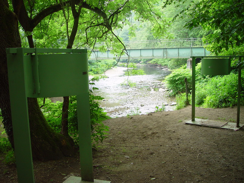 Regentrommeln an der Wupperbrücke in Solingen-Strohn